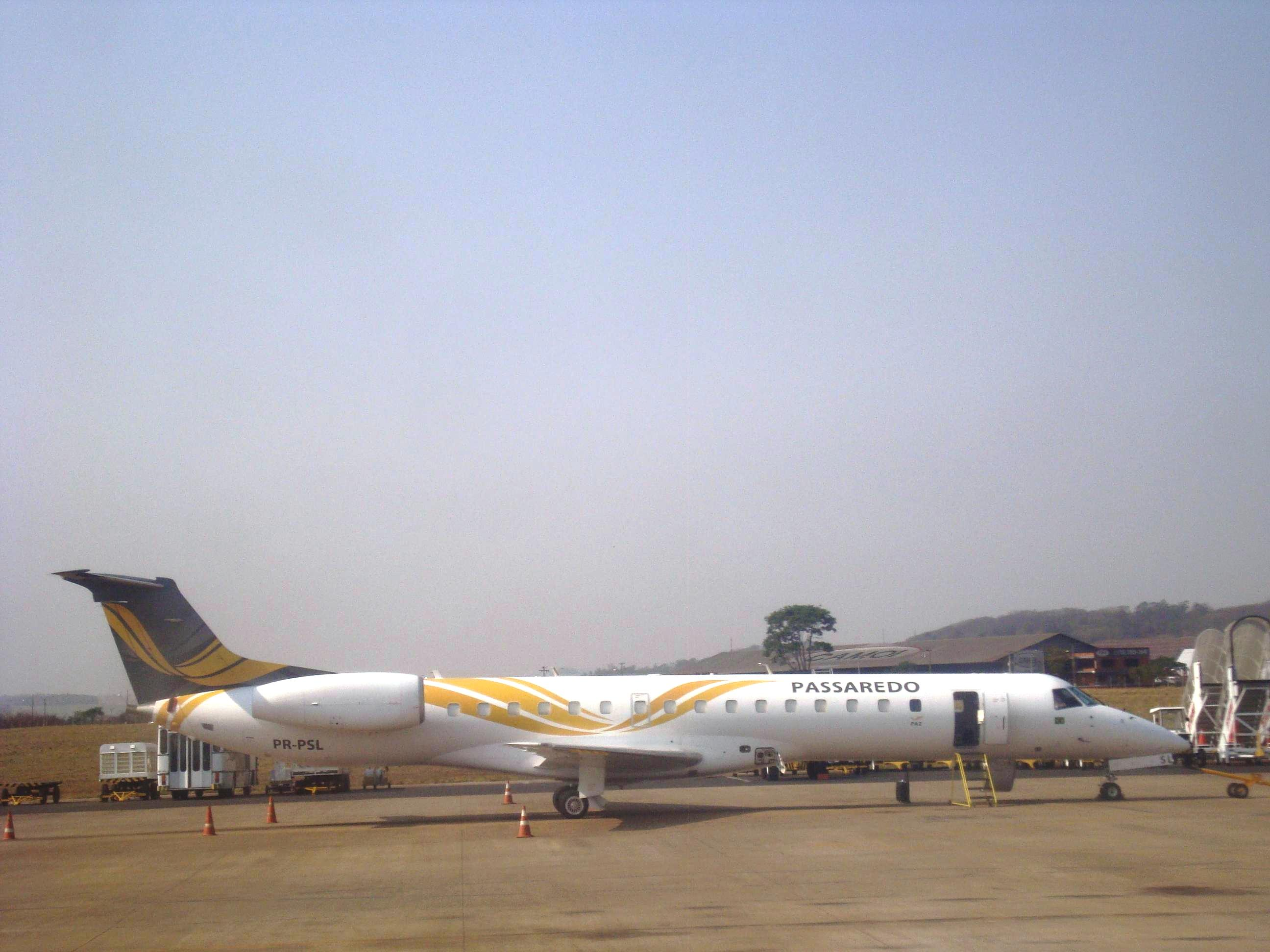 Aeronave ERJ 145 da Passaredo Linhas Aéreas